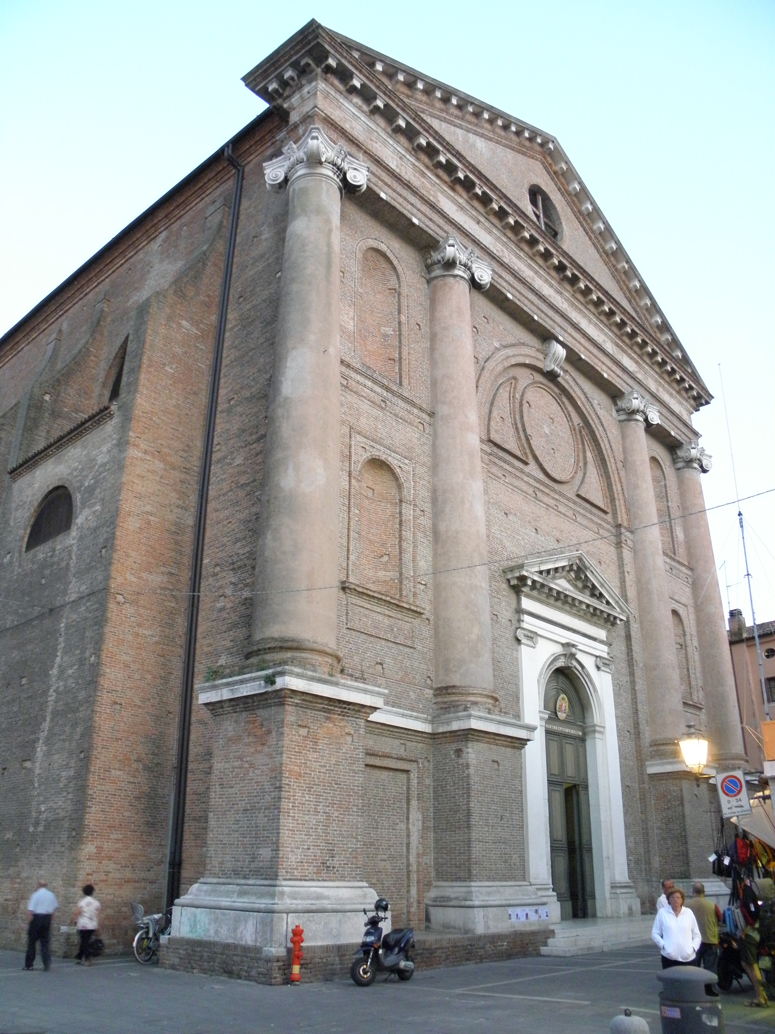 Sottomarina, frazione di Chioggia: la chiesa parrocchiale di San Martino.